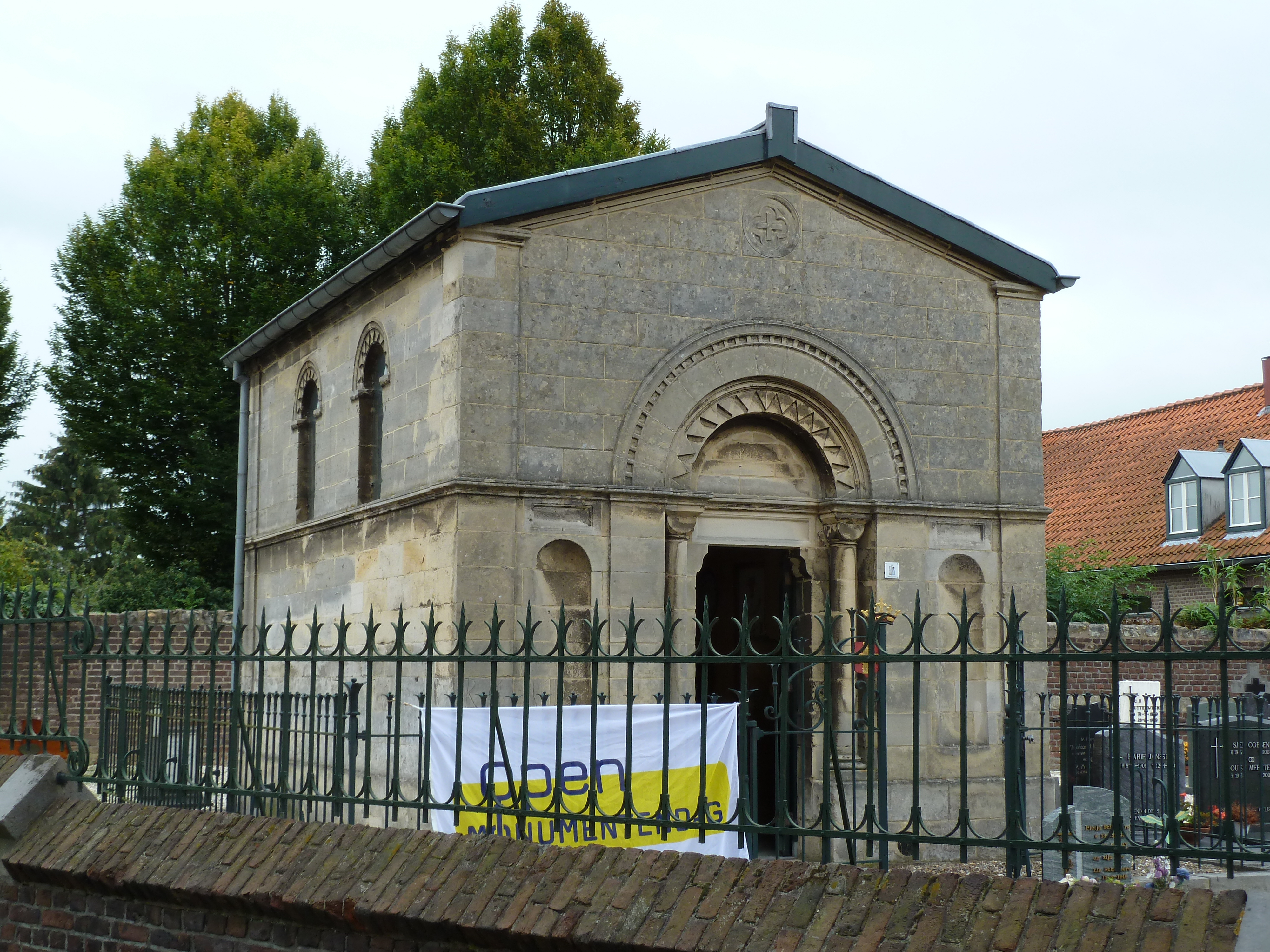 Grafkapel op kerkhof bij kerk Op de Berg, Elsloo, Limburg, Nederland